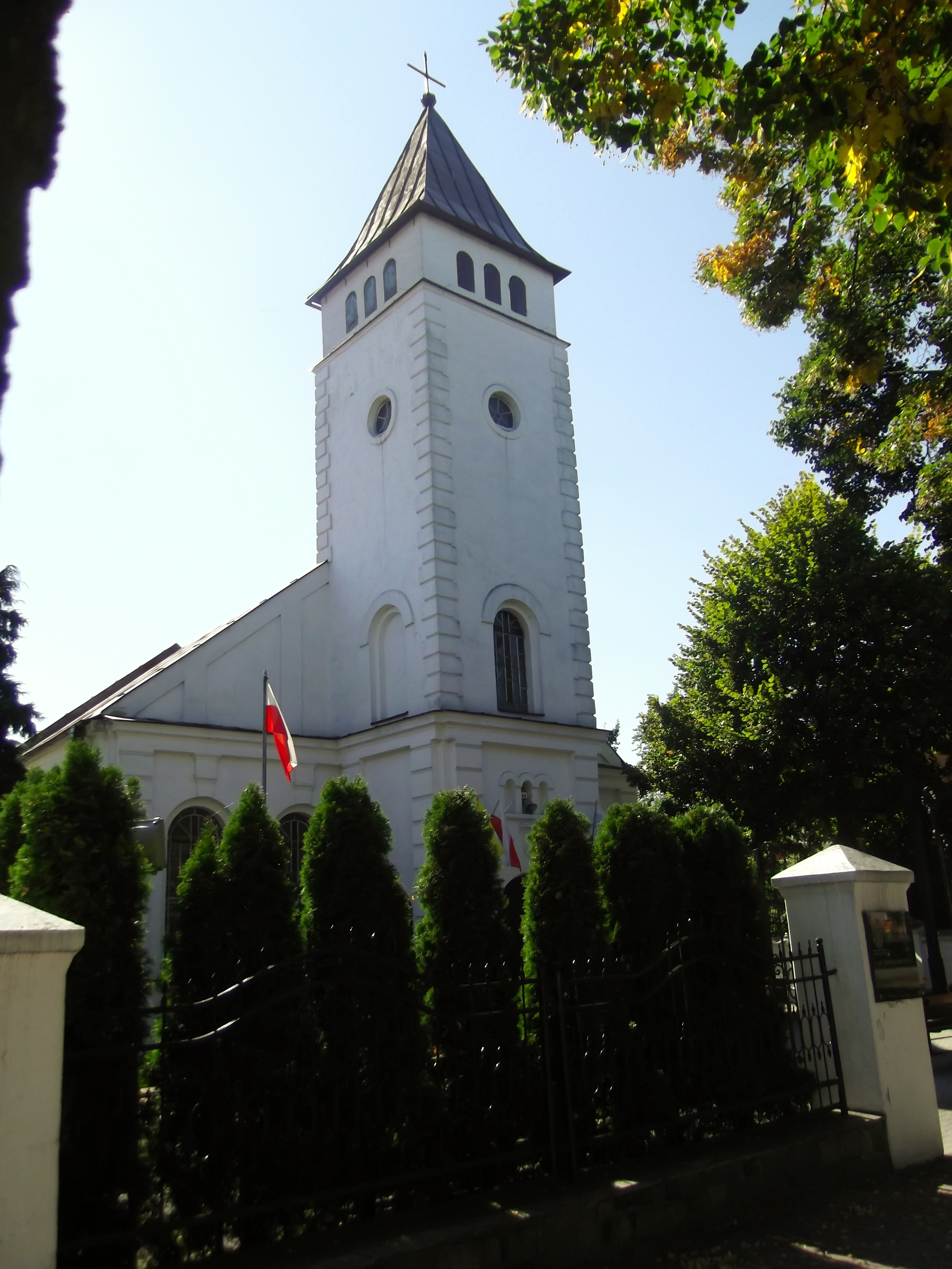 Sieradz, kościół Chrystusa Odkupiciela i Najświętszego Imienia Maryi, pocz. XX